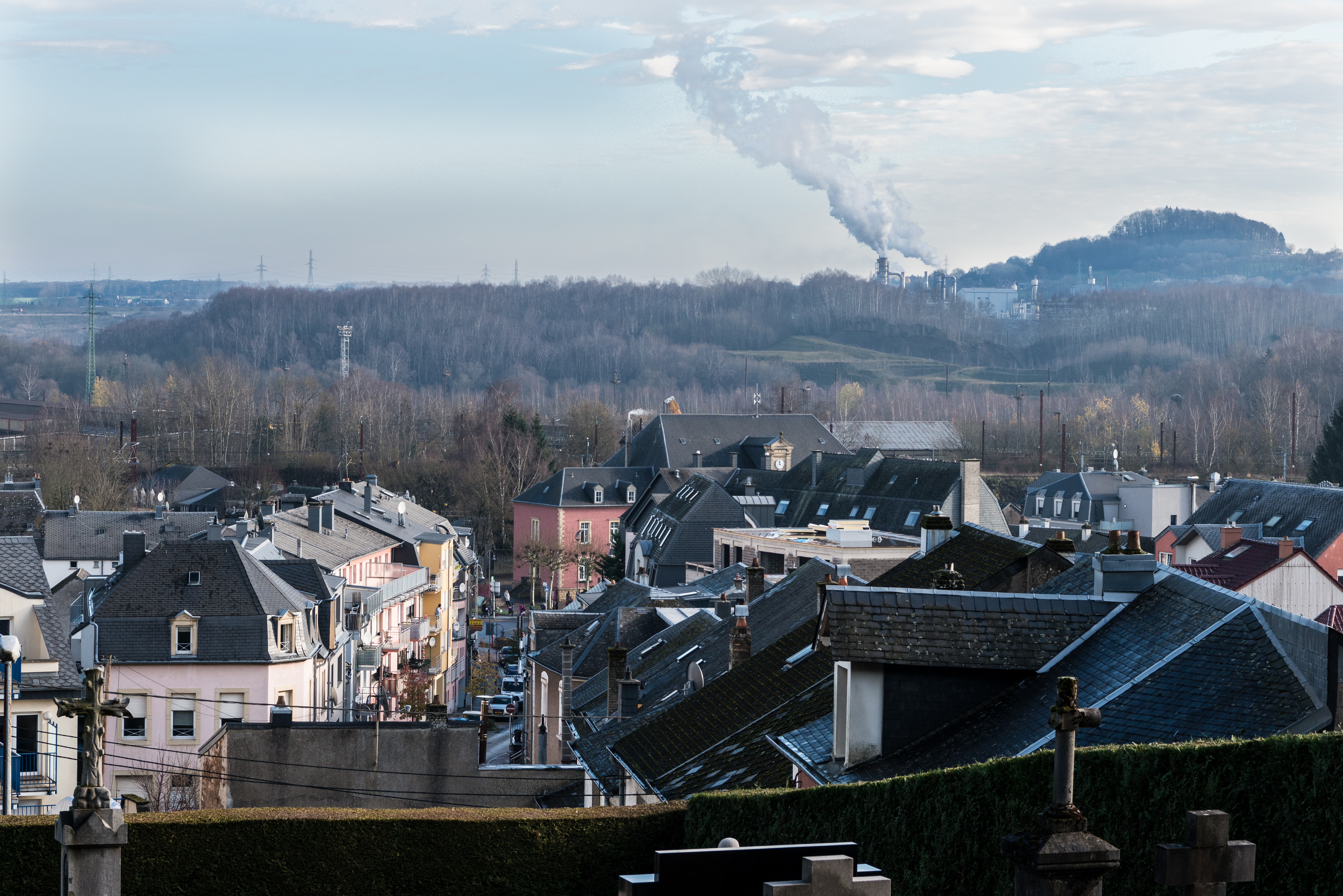 Eng Vue vum Kierfecht op Nidderkuer.